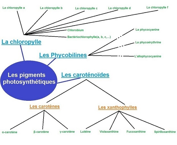 liste des pigments photosynthétiques